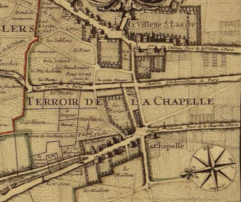 Plan partiel tiré du plan du terroir de St Denis en France et des paroisses alentours comprenant le terroir de La Chapelle